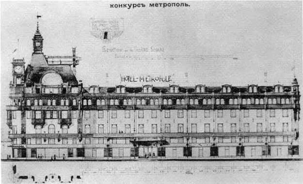 В. Ф. Валькот. Проект фасада гостиницы "Метрополь" в Москве